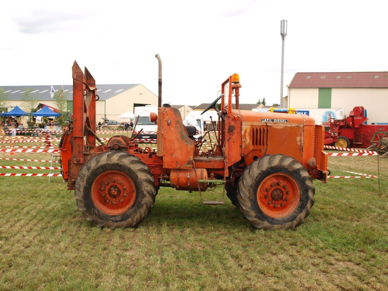 Véron (Yonne, France) ; lors de la fête agricole 2013